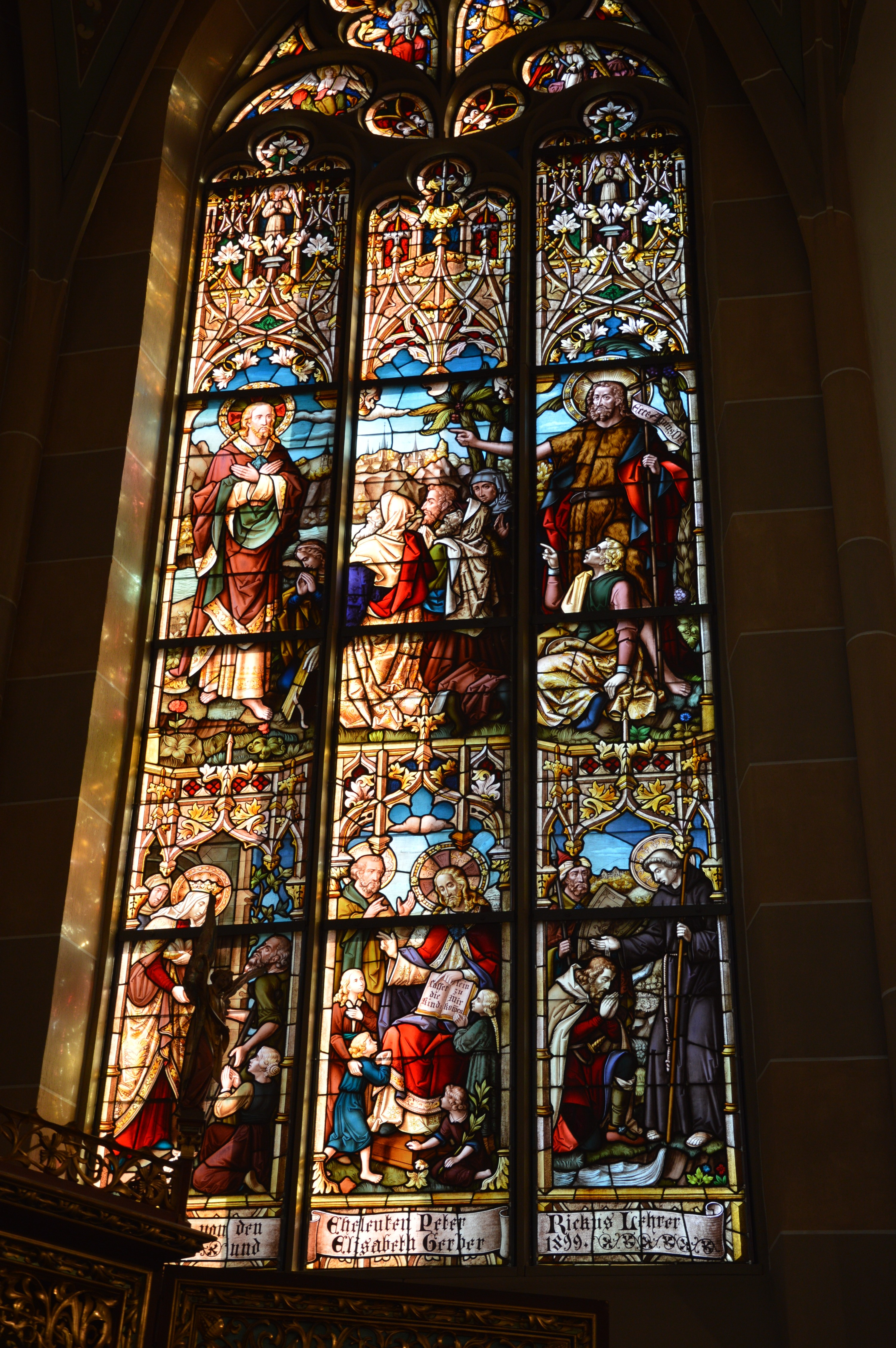 Rechtes Chorfenster Pfarrkirche St. Matthäus Bad Sobernheim.jpg